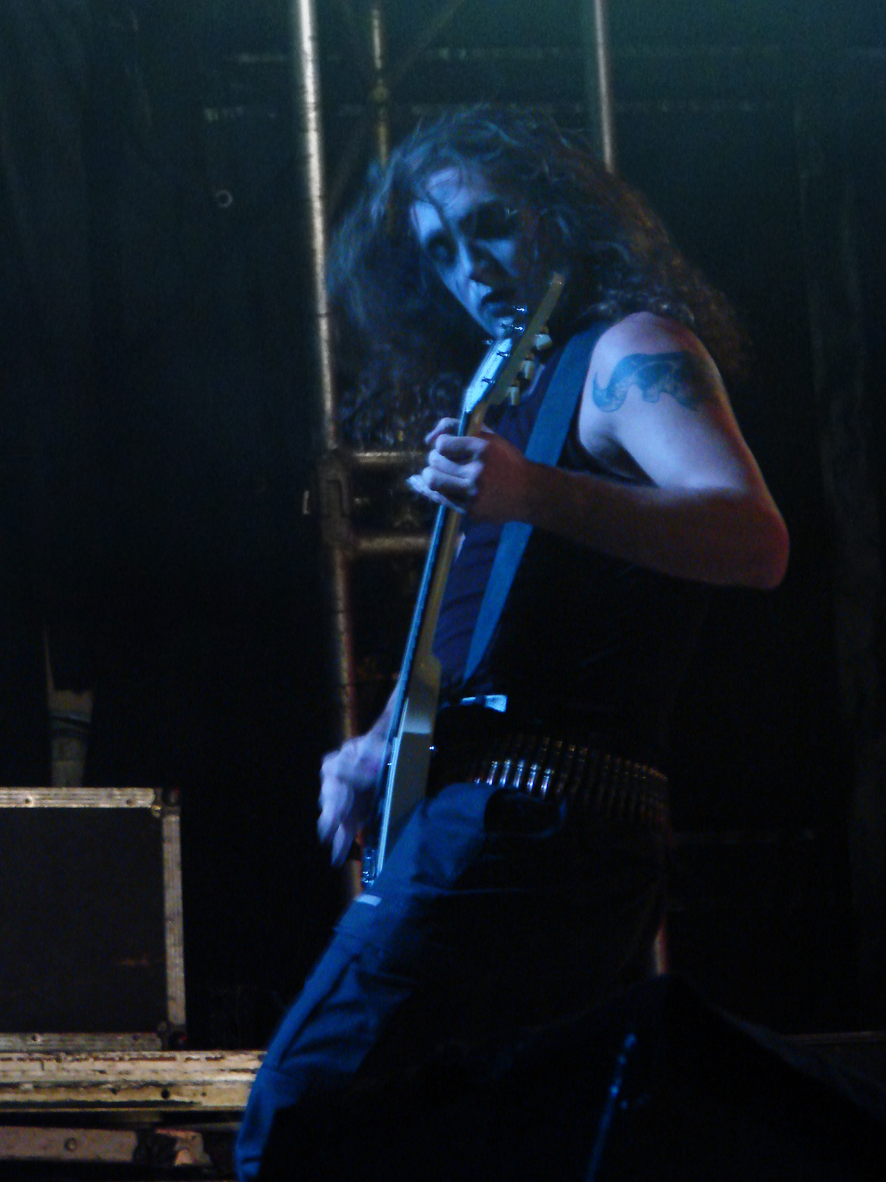 Marduk en concert à l'Elysée-Monmartre, Paris, le 2/12/2007.Devo Andersson à la basse.